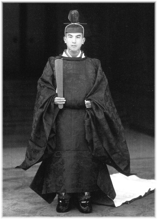 徳彦王（梨本徳彦）